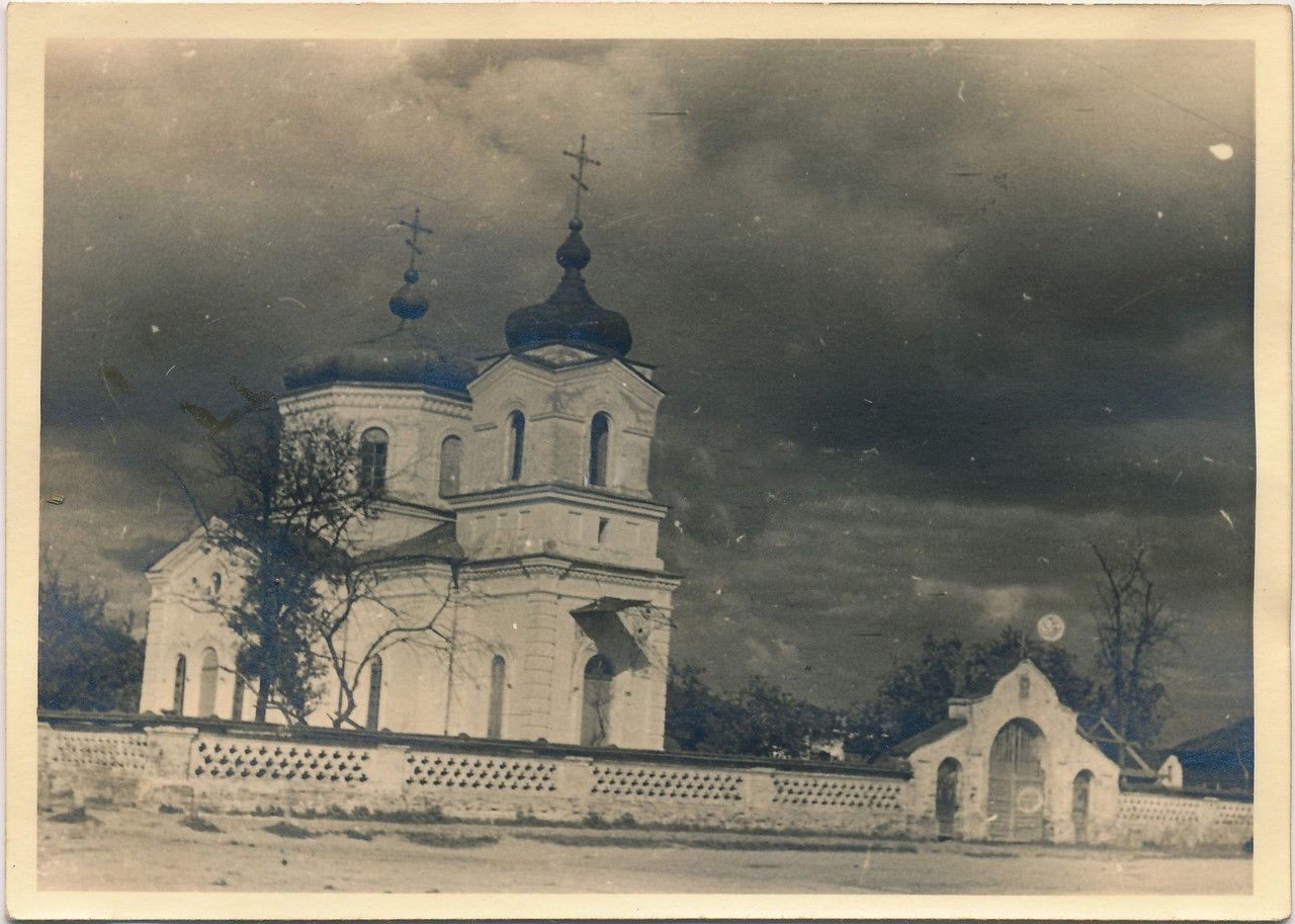 Беларуская (тарашкевіца): Клімавічы (Klimavičy), пляц Рынак (plac Rynak). Царква